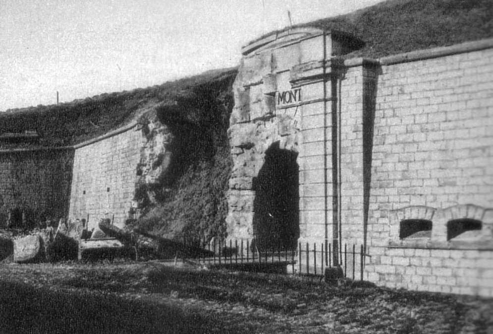 Eingangstor von Fort Douaumont